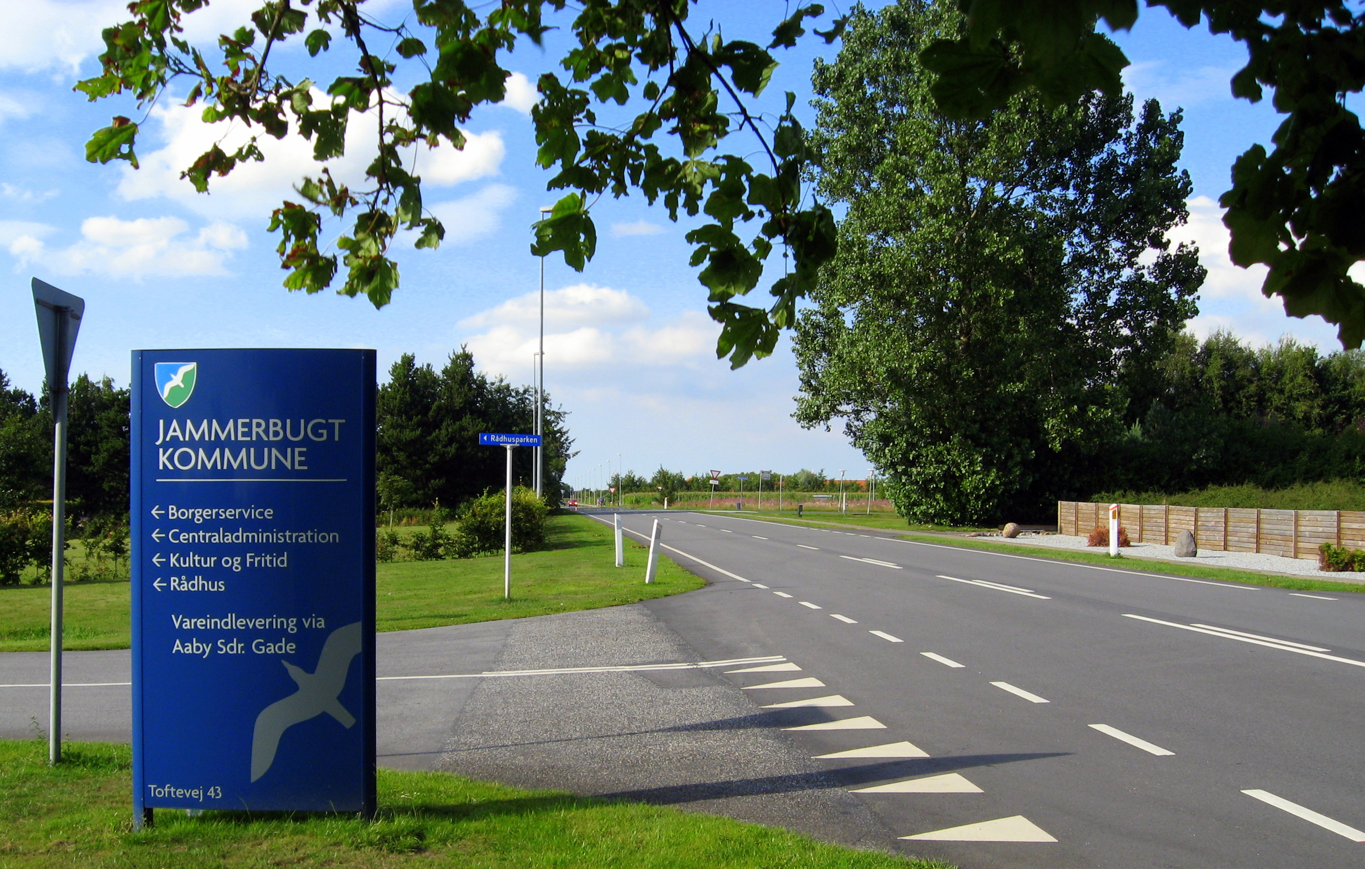 Jammerbugt Kommune